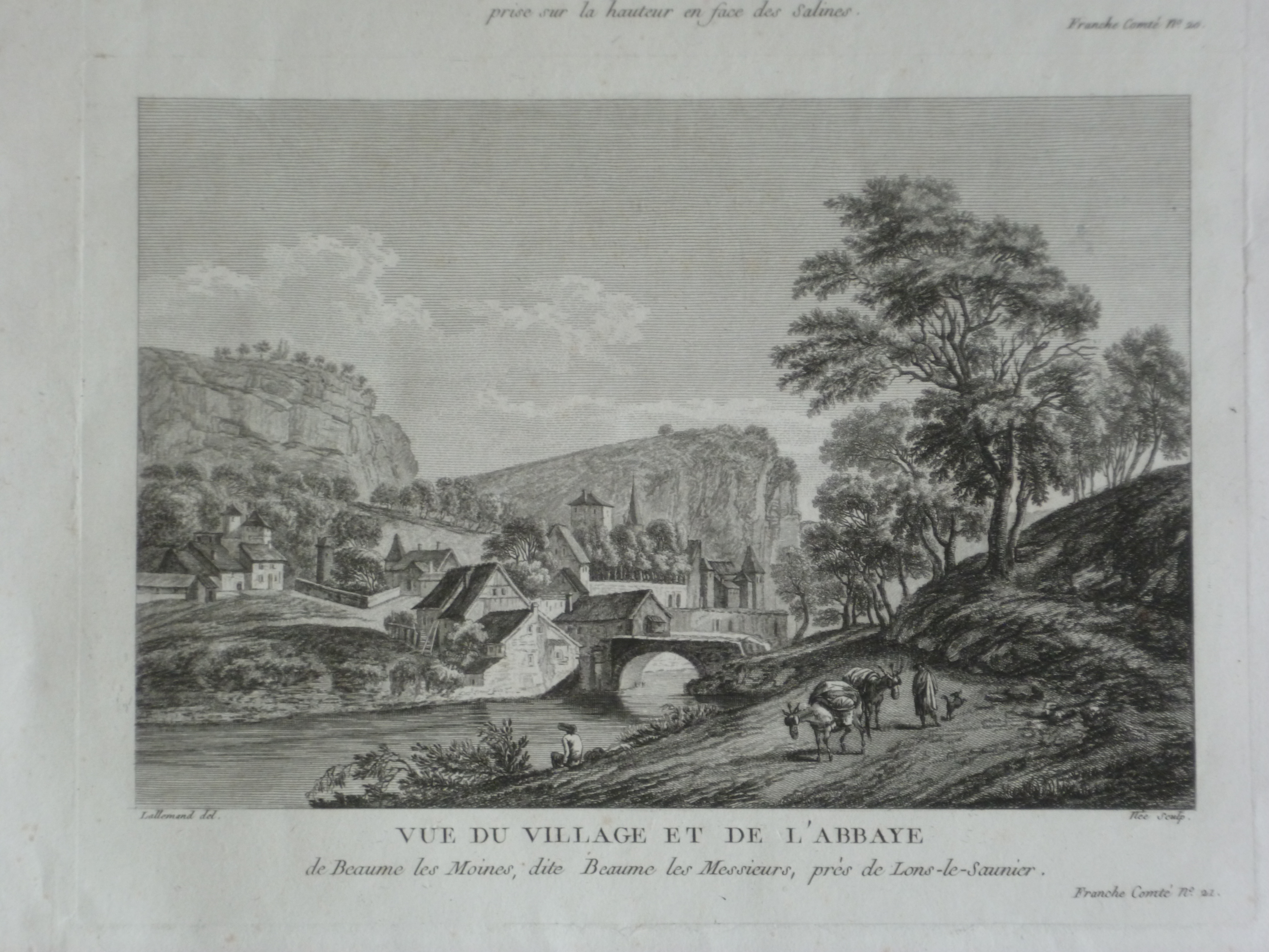 Abbaye de Baume-les-Messieurs par Jean-Baptiste Lallemand